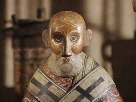 Никола. Деревянная скульптура из хранилища Вологодского музея. XVII-XVIII век.